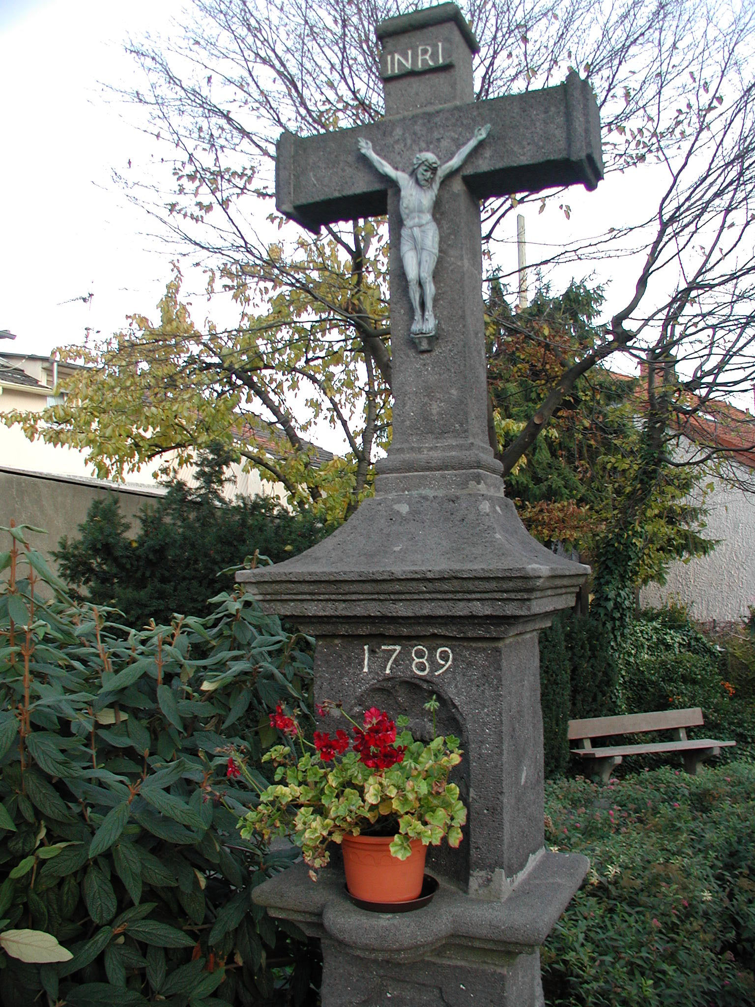 Hürth-Fischenich, Wegekreuz